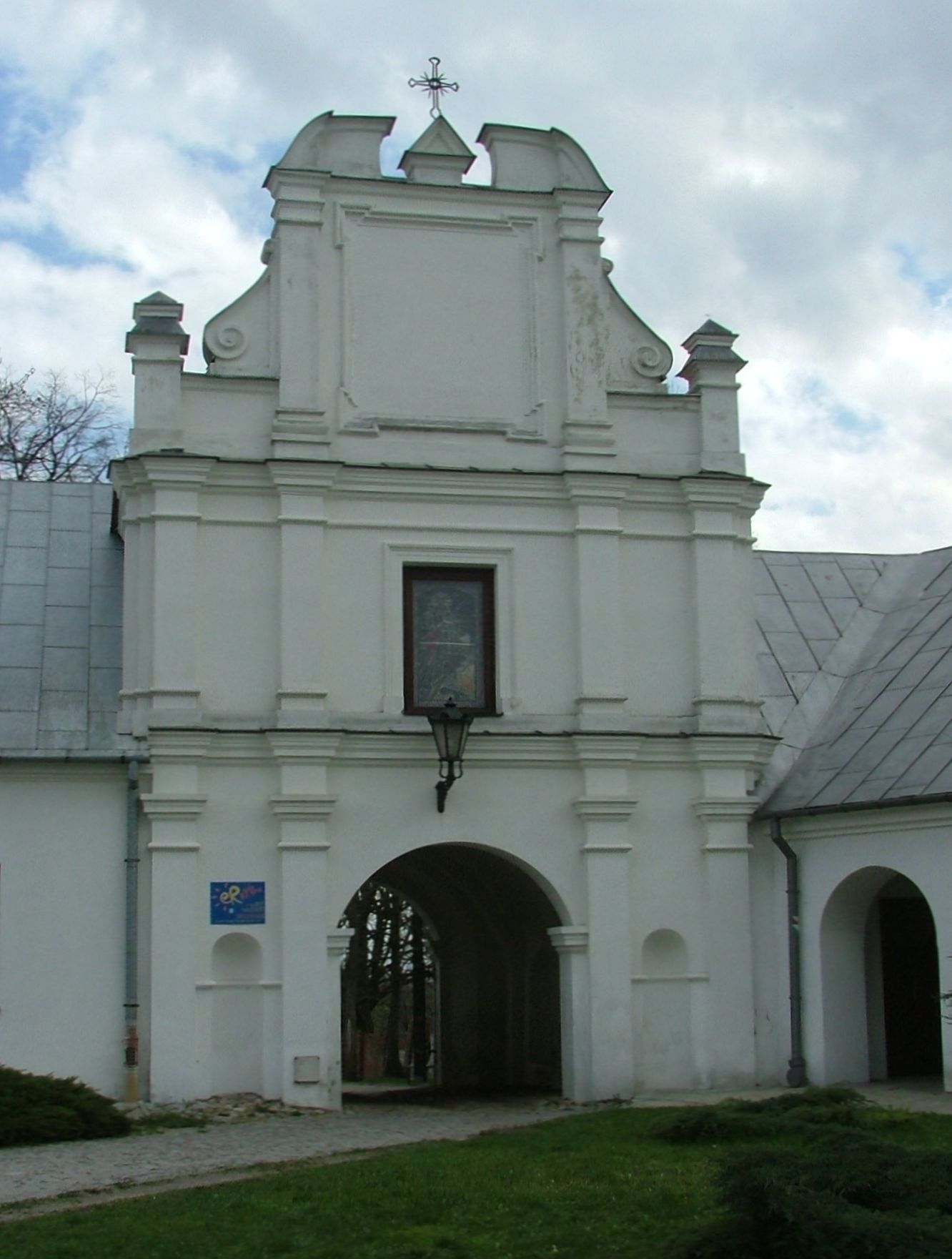 Chełm - Brama Uściłuska